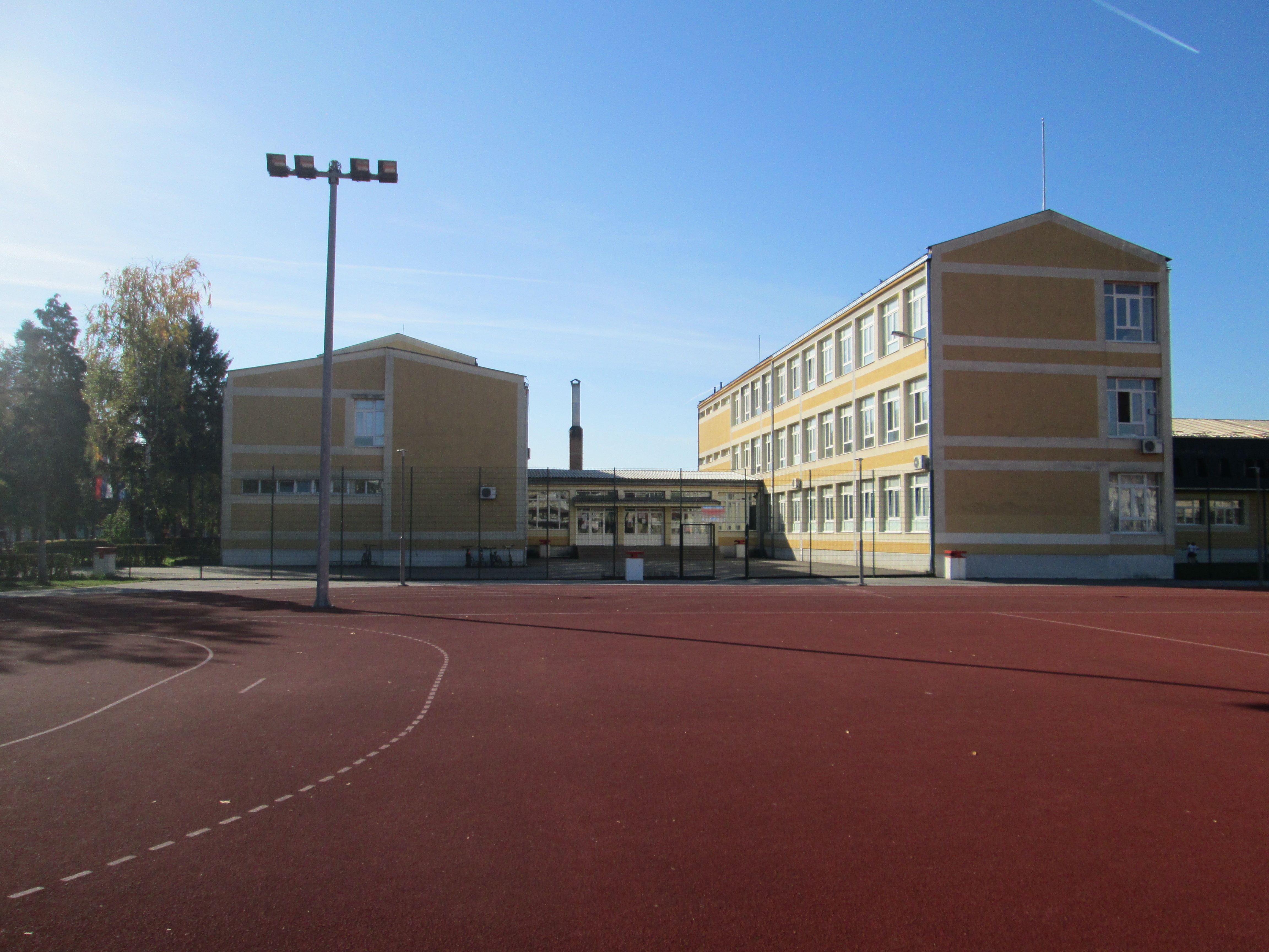 Са терена